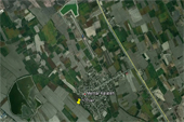 مهترکلاته از بالا